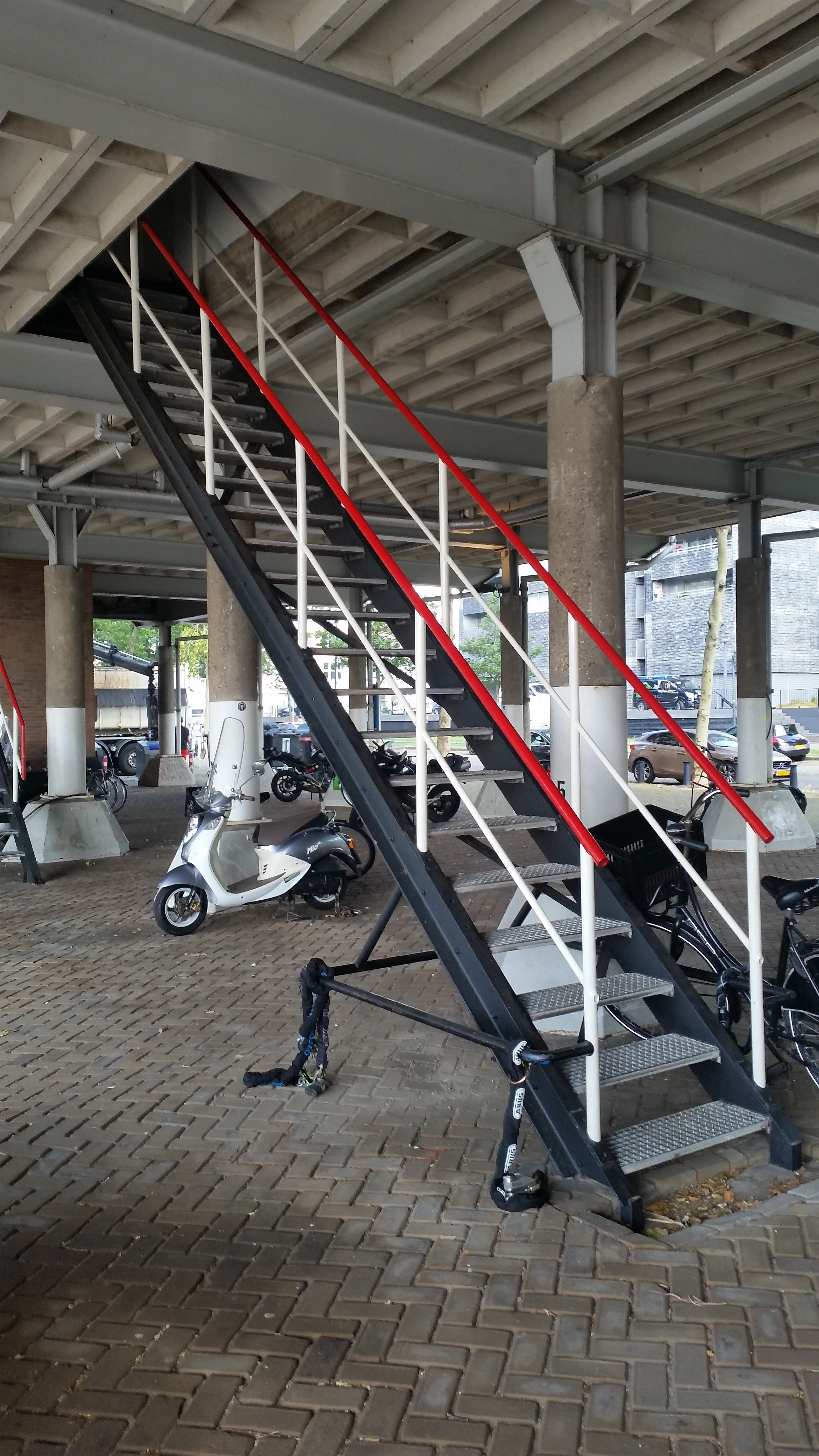 Scheepstrap als (nood)uitgang van Levantplein 1-15, Amsterdam